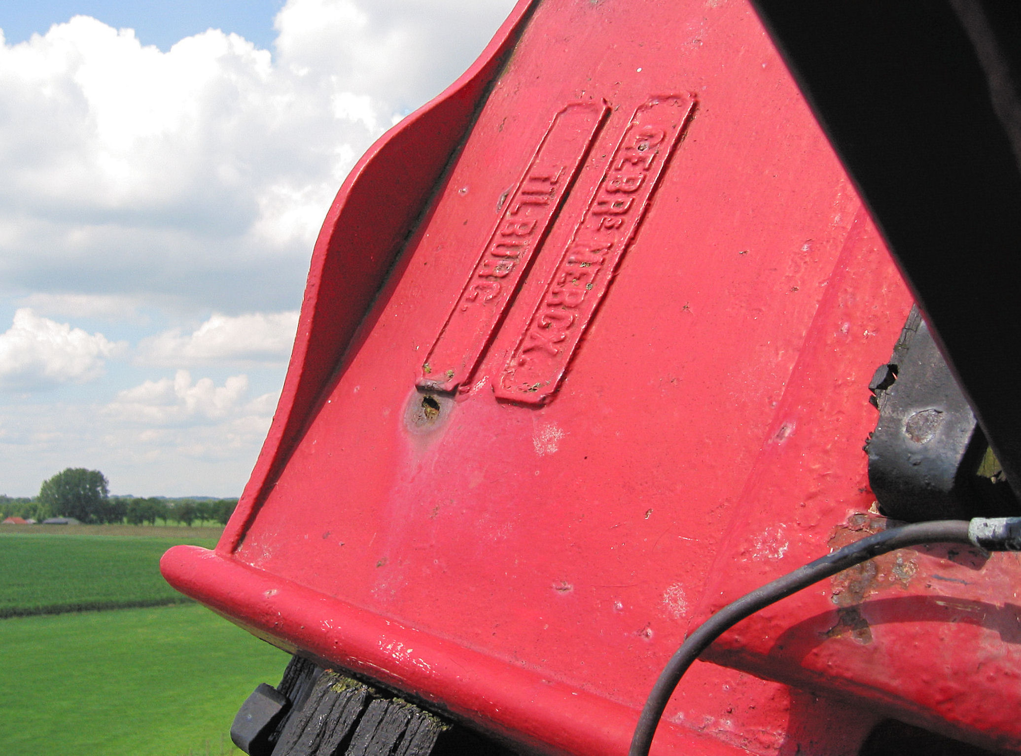 Askop van de molen Tot Voordeel en Genoegen in Alphen aan de Maas, the Netherlands.